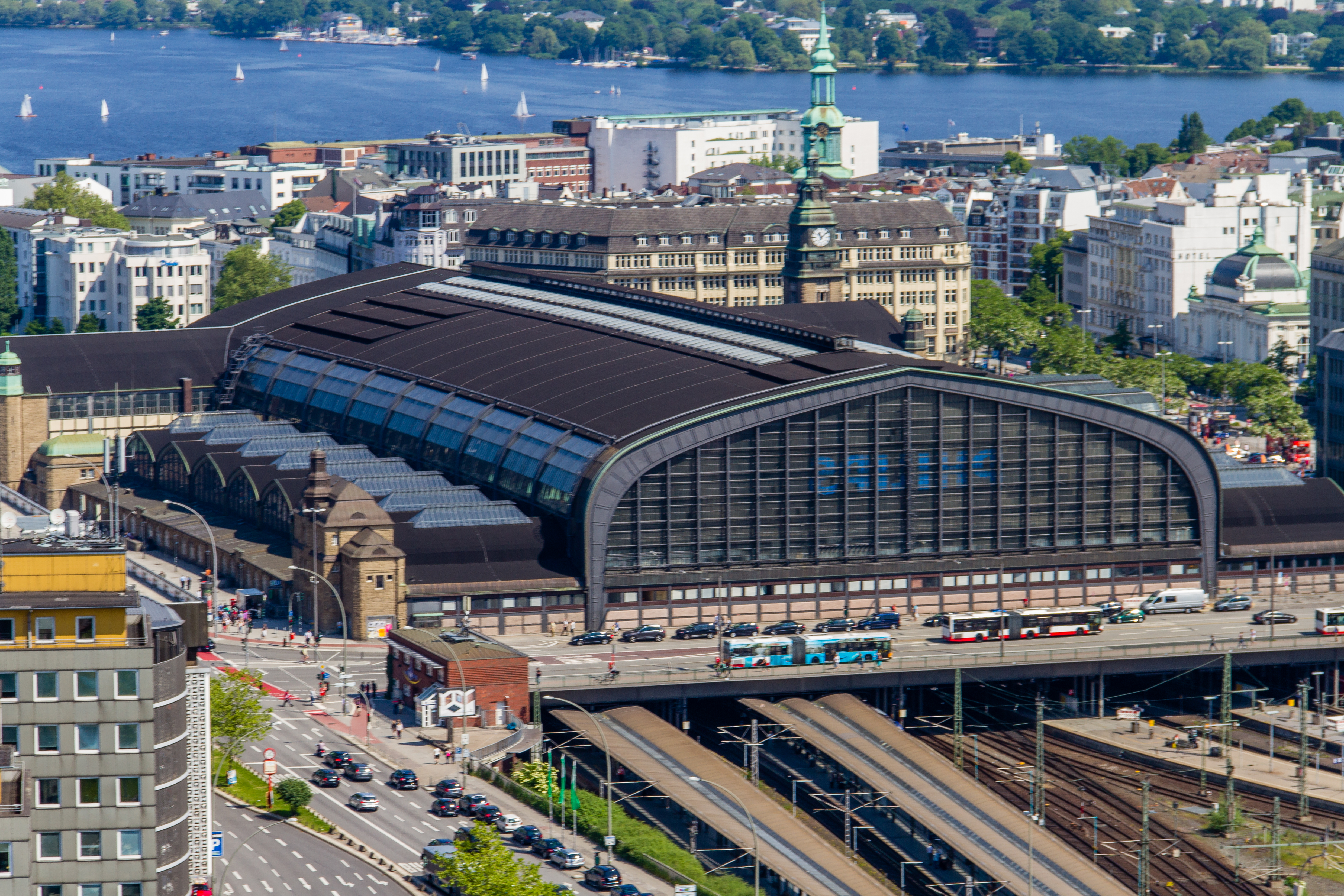 Aufnahme während des Projekts Heißluftballon